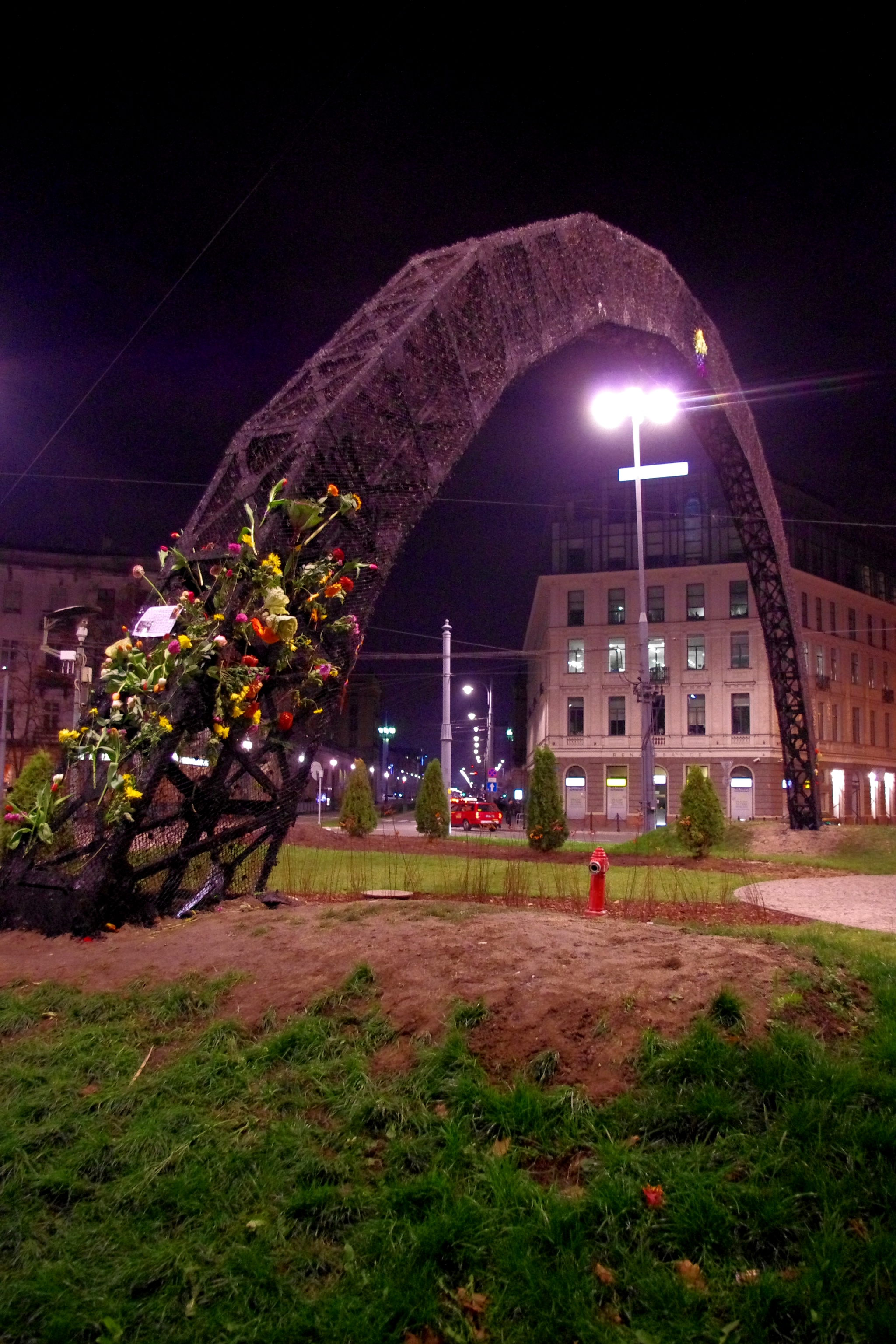 ”Tęcza” ma warszawskim placu Zbawiciela, dzień po spaleniu podczas Marszu Niepodległości 2013